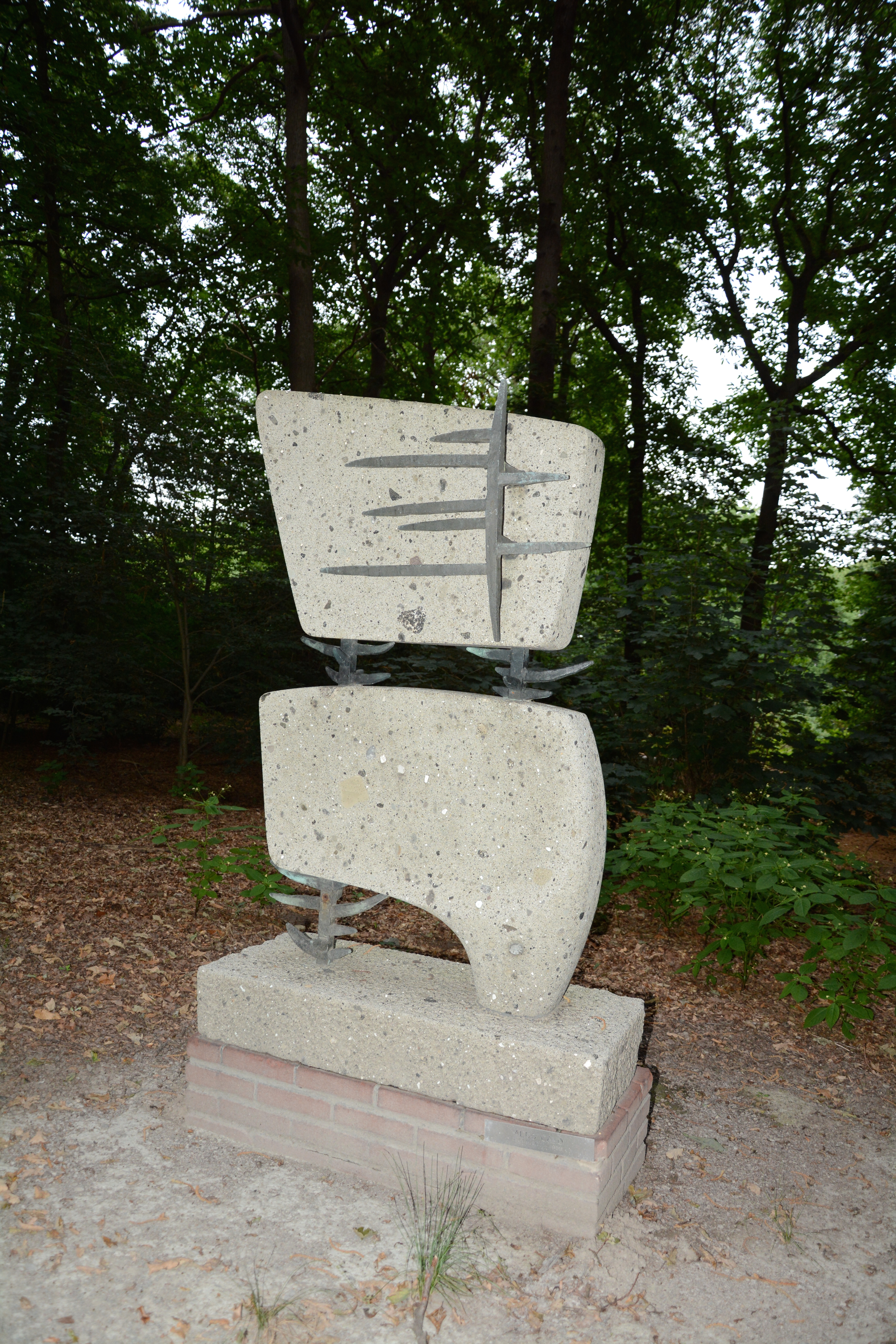 Aldo Calo, Biforma, 1959